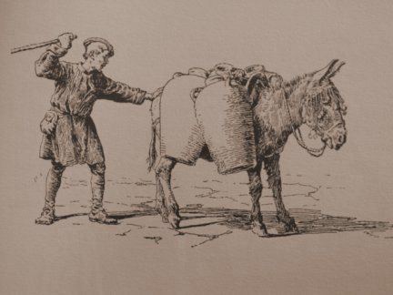 Grabado 'Lazaro aguador'. Lámina del Lazarillo de Tormes. Tratado sexto. Cómo Lázaro se asentó con un capellán, y lo que con él pasó "Siendo ya en este tiempo buen mozuelo, entrando un día en la iglesia mayor, un capellán de ella me recibió por suyo, y púsome en poder un asno y cuatro cántaros y un azote, y comencé a echar agua por la ciudad. Éste fue el primer escalón que yo subí para venir a alcanzar buena vida, porque mi boca era medida. Daba cada día a mi amo treinta maravedís ganados, y los sábados ganaba para mí, y todo lo demás, entre semana, de treinta maravedís y me quedaba con todo lo que pasase de treinta maravedís diarios."